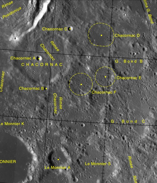 Cráter Chacornac LROC